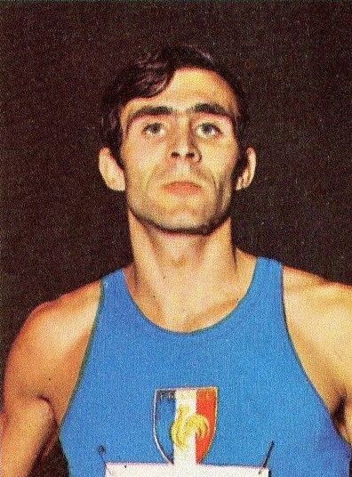 CAMPIONI dello SPORT 1970/71-n.34- CLERC - ATLETICA LEGGERA